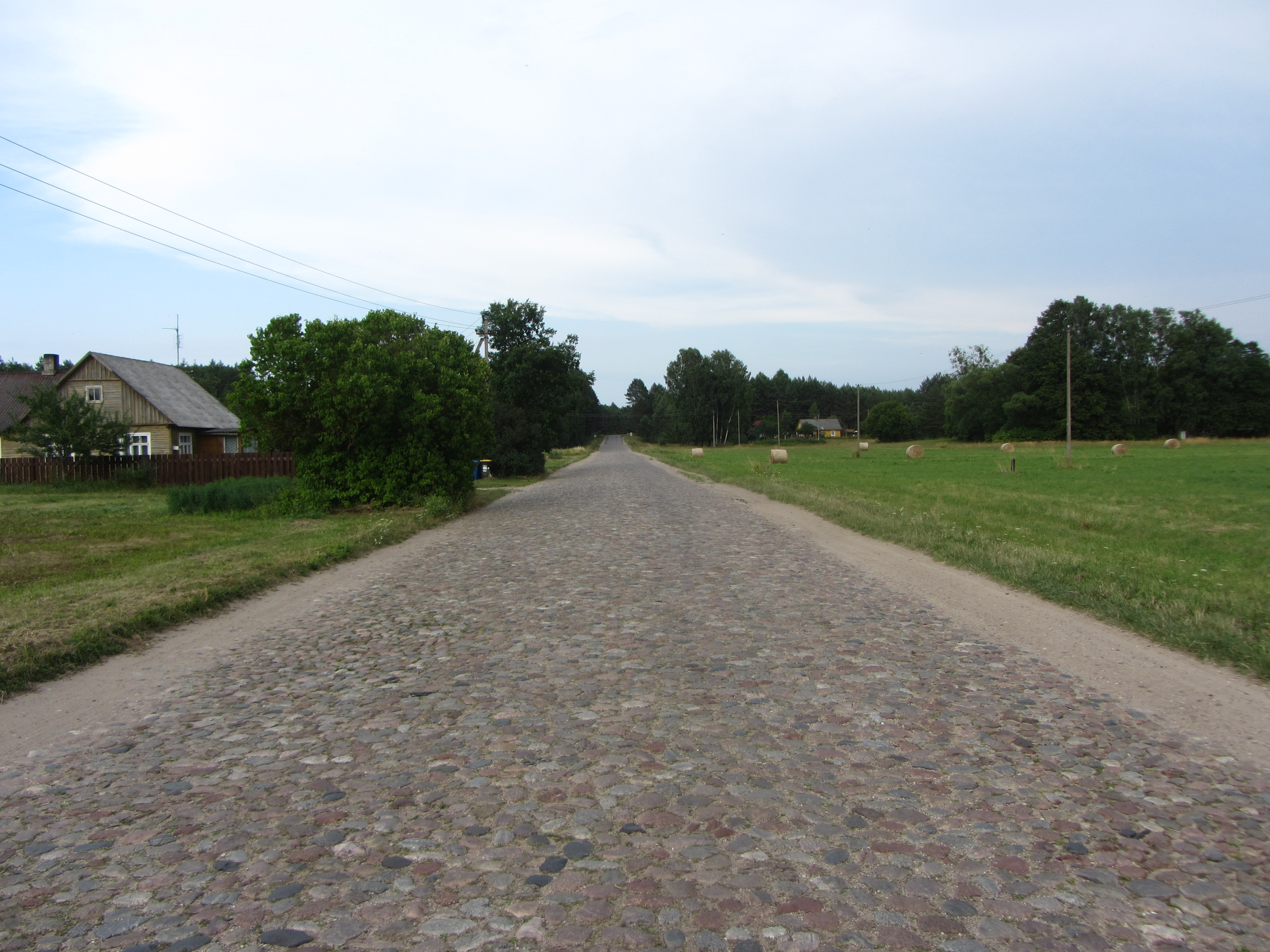 Kapčiamiesčio sen., Lithuania